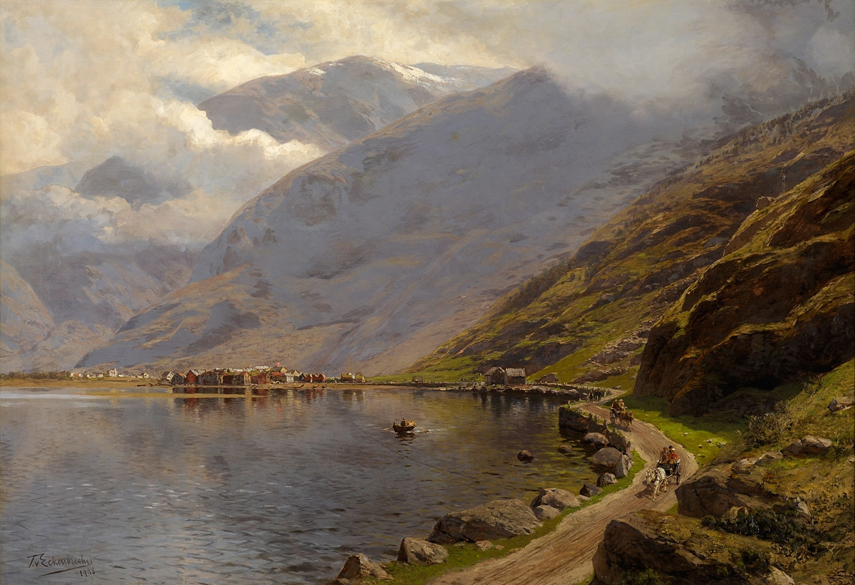 Laerdal-Soeren-Fjord, Norwegen. Signiert. Datiert 1908. Rückseite betitelt. Öl auf Leinwand, 100 x 148 cm